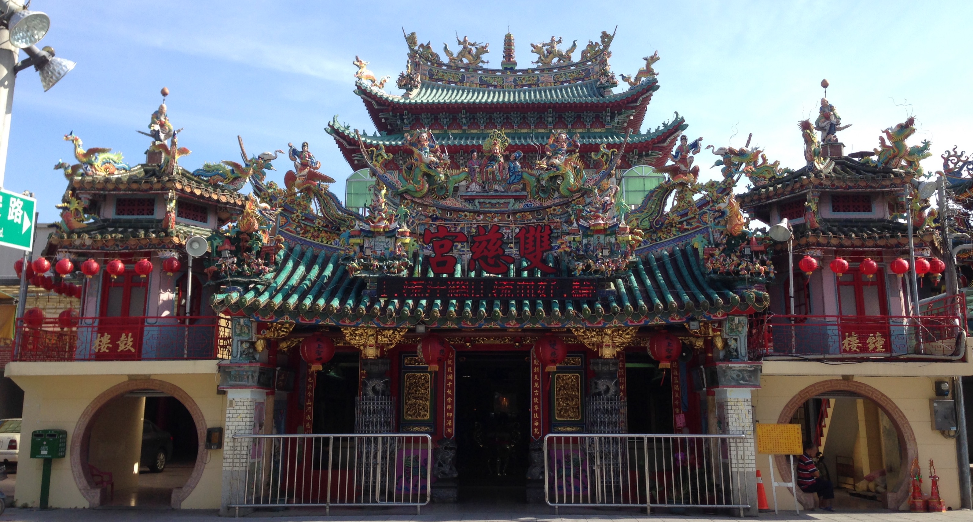 里港雙慈宮